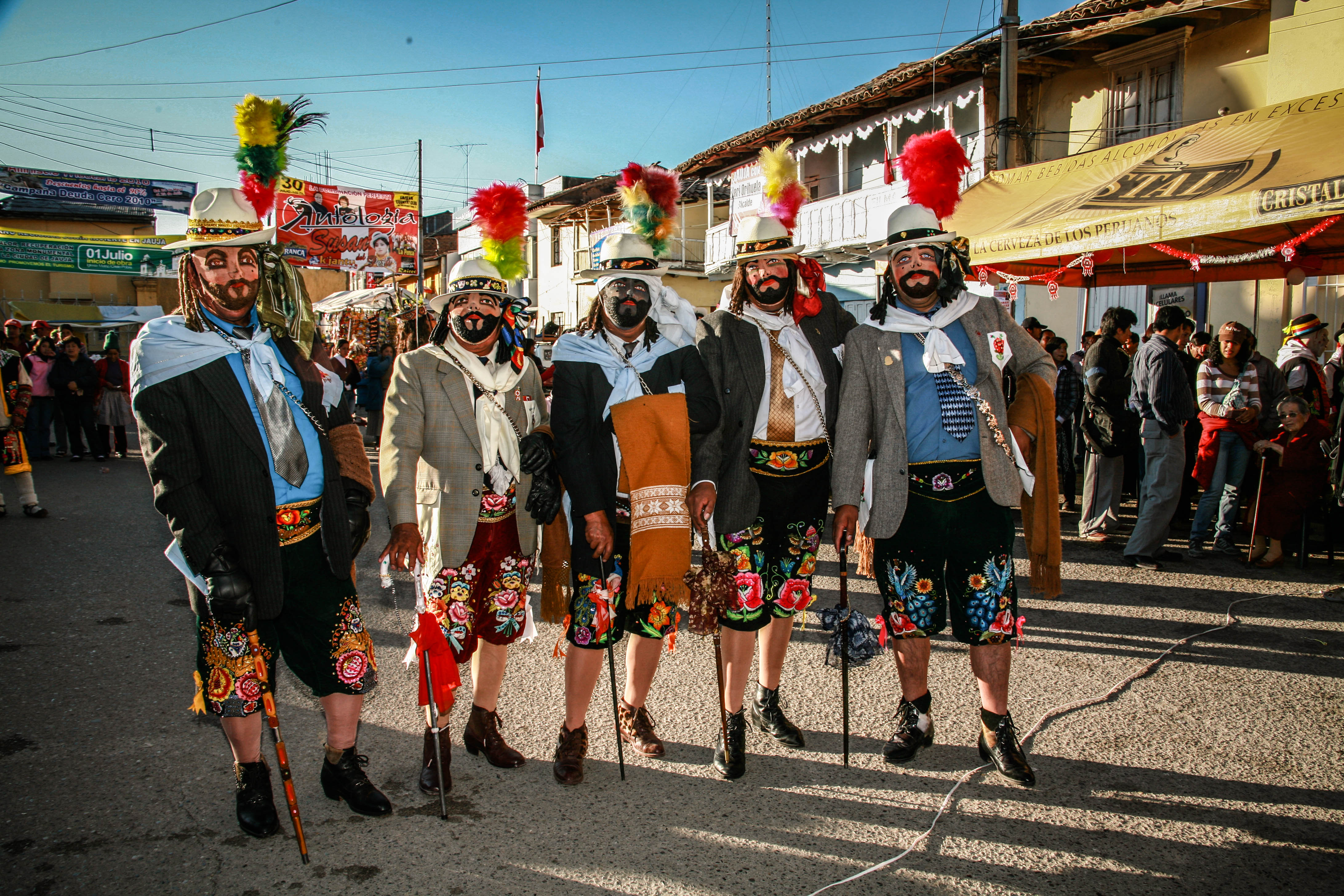 El Español de Tunantada, también llamado príncipe, es un personaje que integra la Tunantada, originaria de Jauja. Baile declarado patrimonio de la Nación del Perú.